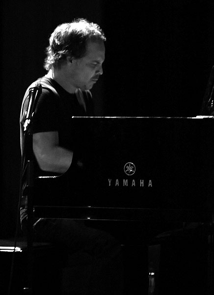 Steve Koven